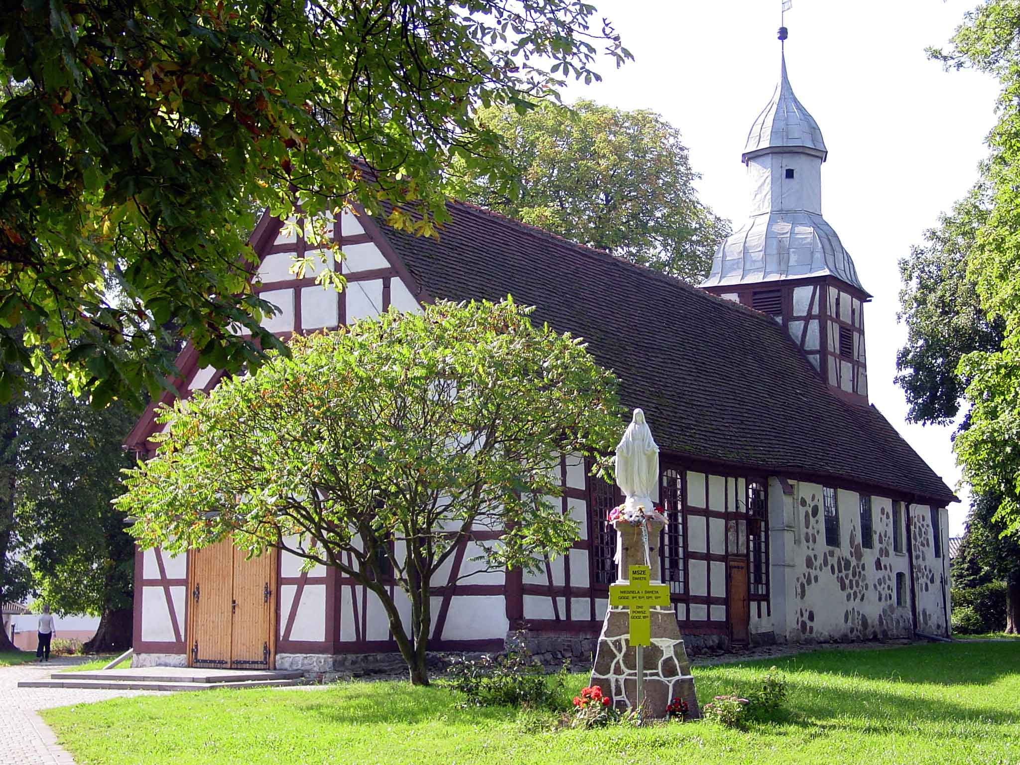 Widok na kościół w Tychowie; autor zdjęcia Kluka; 02.02.2000r.